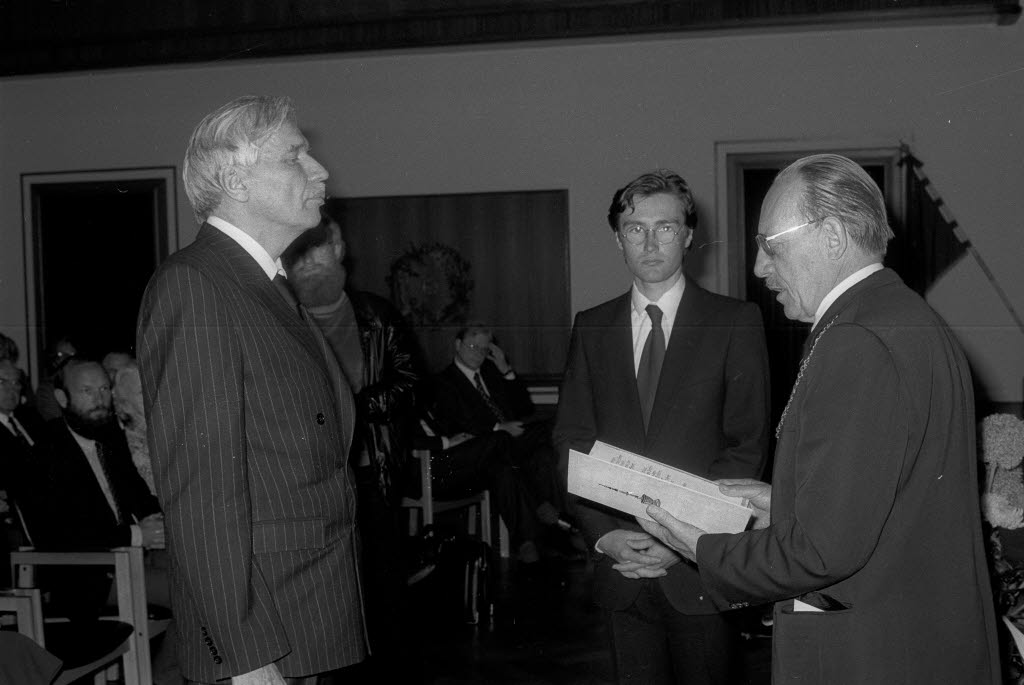 im Ratssaal des Rathauses. Im Bild übergibt der Präsident der Christian-Albrechts-Universität (CAU) Prof. Dr. Gerd Griesser (rechts) die Urkunde an den Preisträger Prof. Dr. Erik Tawaststjerna (links) aus Helsinki. In der Bildmitte vermutlich der Henrik-Steffens-Stipendiat Erik Söderblom aus Helsinki. Hinten links Stadtpräsident Rolf Johanning.